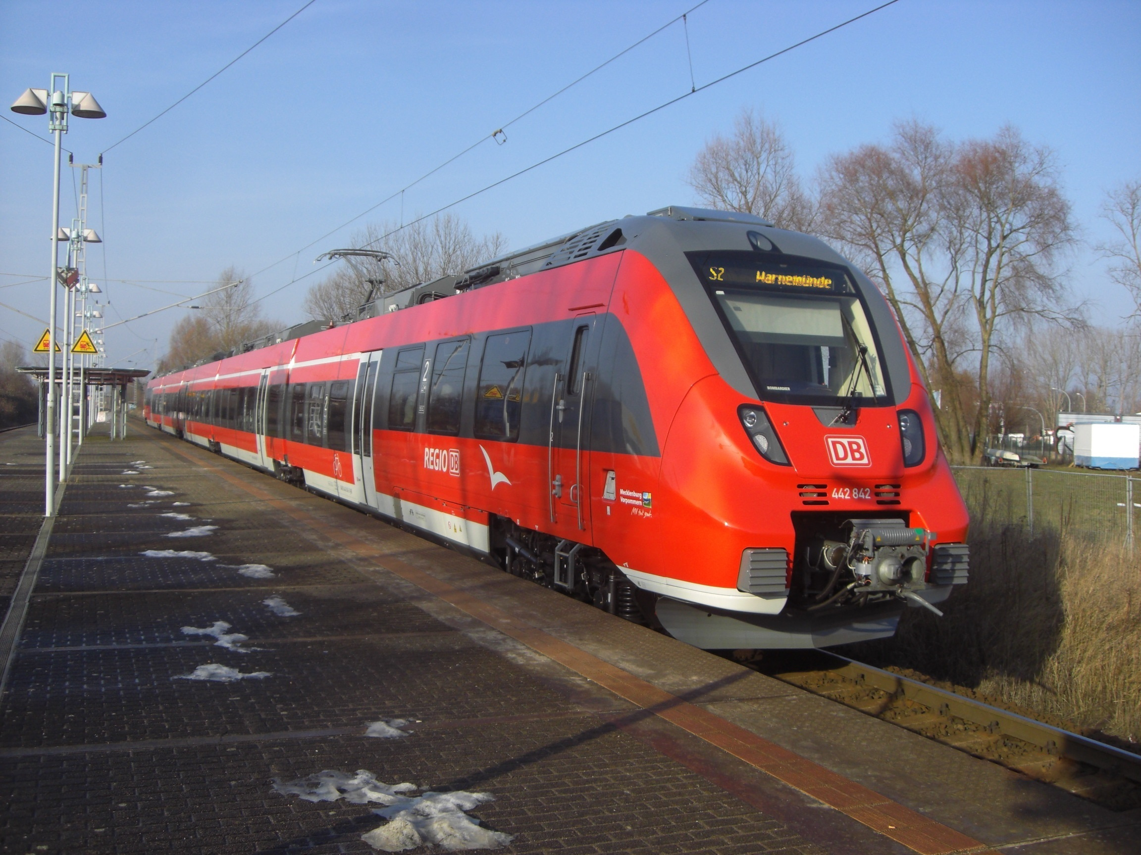 BR 442 als S2 nach Warnemünde bei der Ausfahrt aus Rostock-Marienehe, 05.02.2014